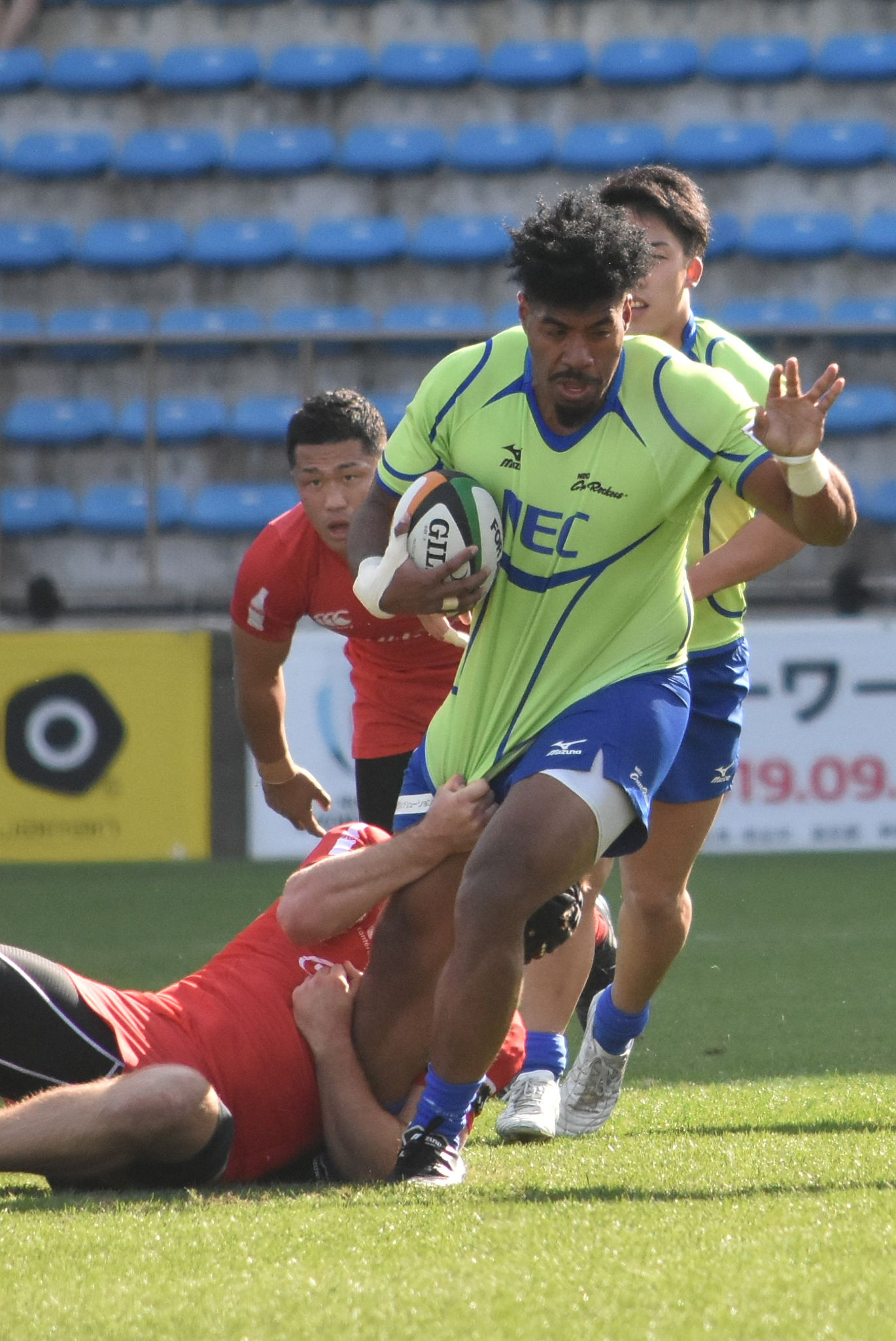 マリティノ・ネマニ